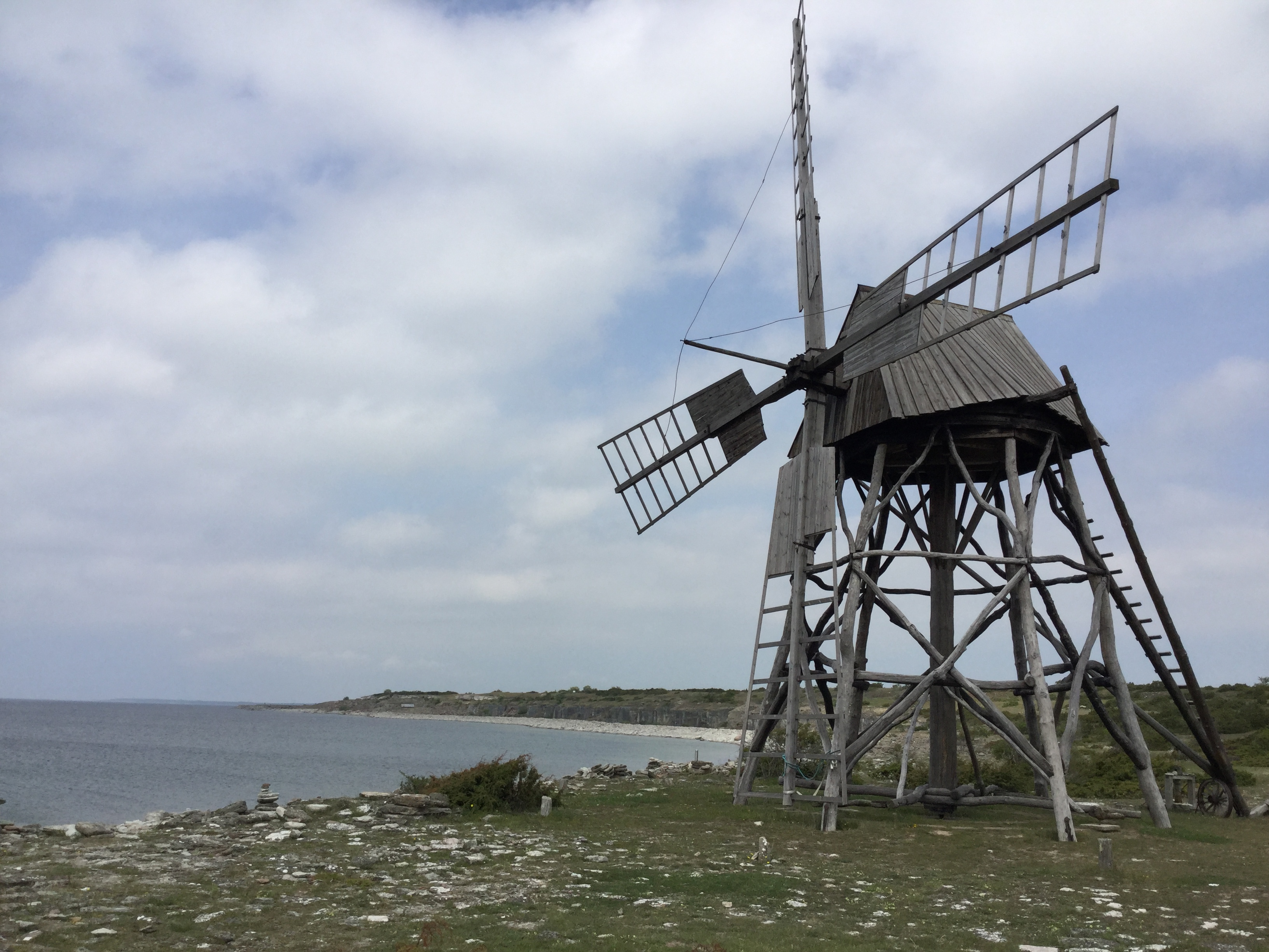 Skurkvarnen i Jordhamn, Öland, i juni 2017.